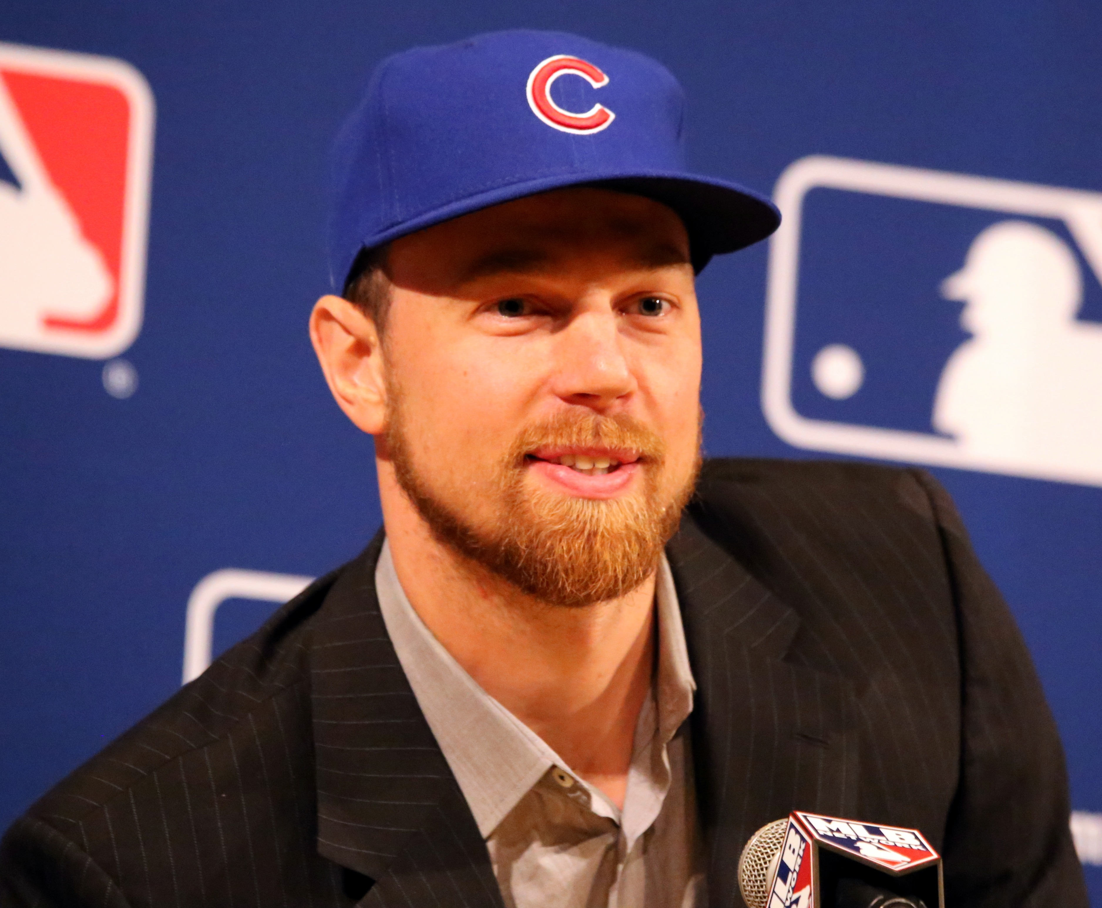 Ben Zobrist